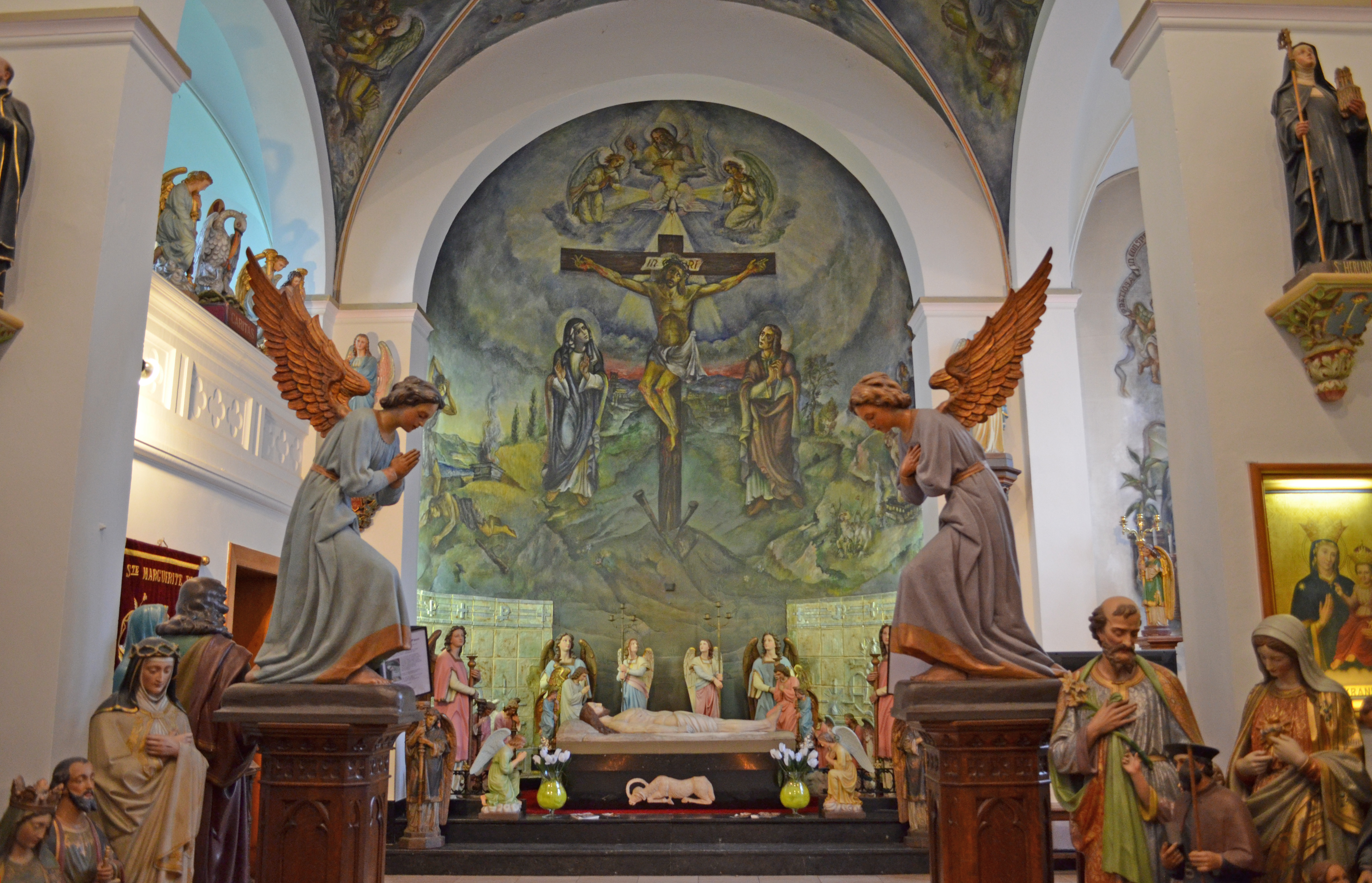 Haus De Esch in Vaals, Apsis der ehemaligen Klosterkapelle; Wandgemälde von Frans Griesenbrock